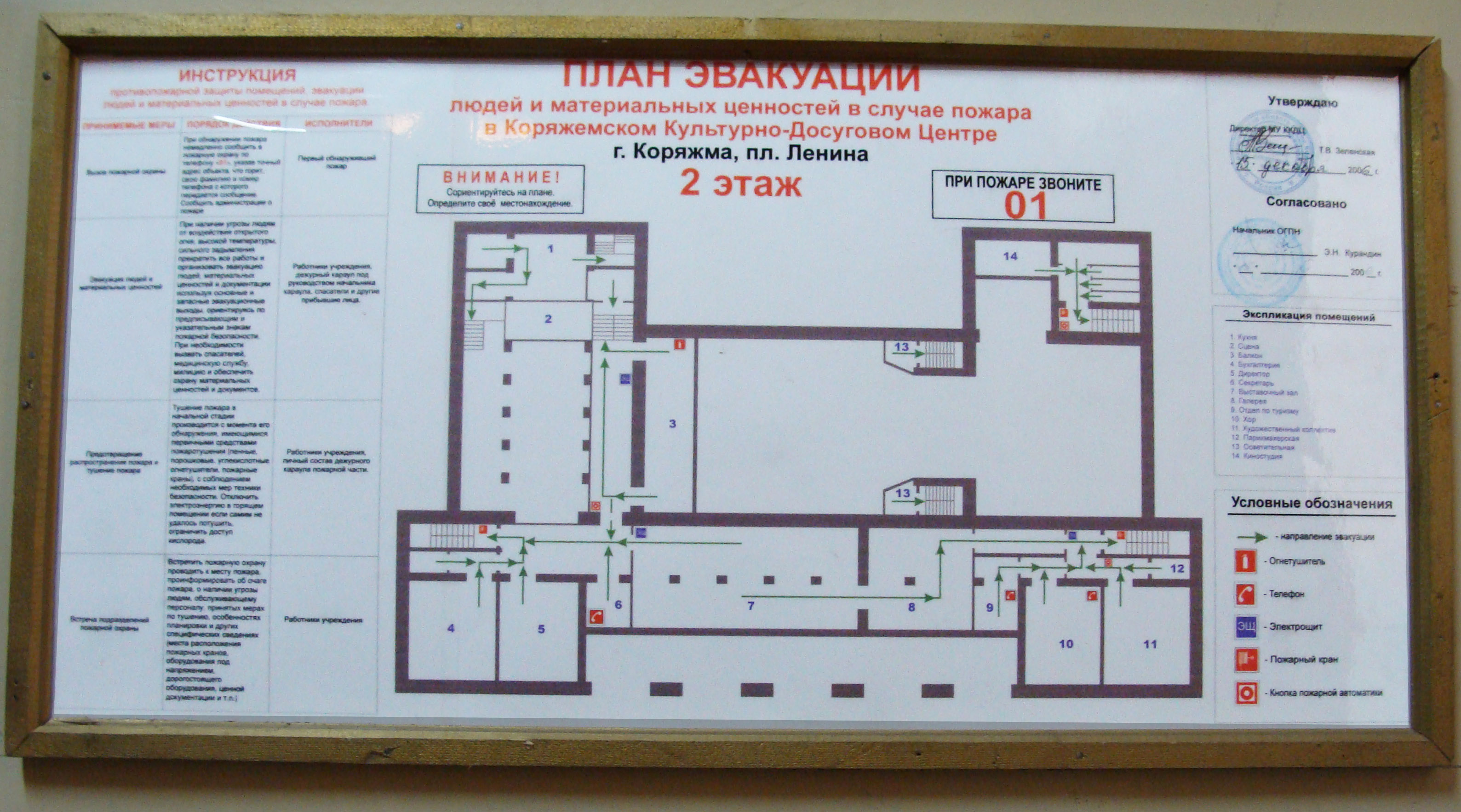 Коряжемский культурно-досуговый центр . План эвакуации. 1 этаж.